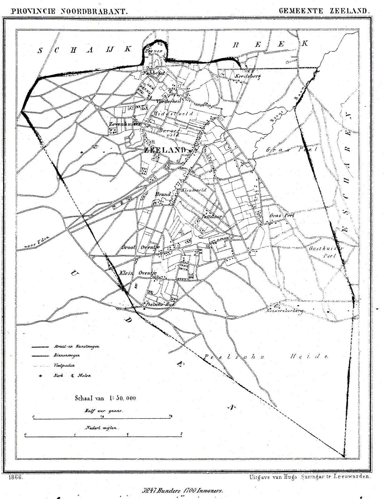 Nederland, Noord-Brabant, Gemeente Zeeland